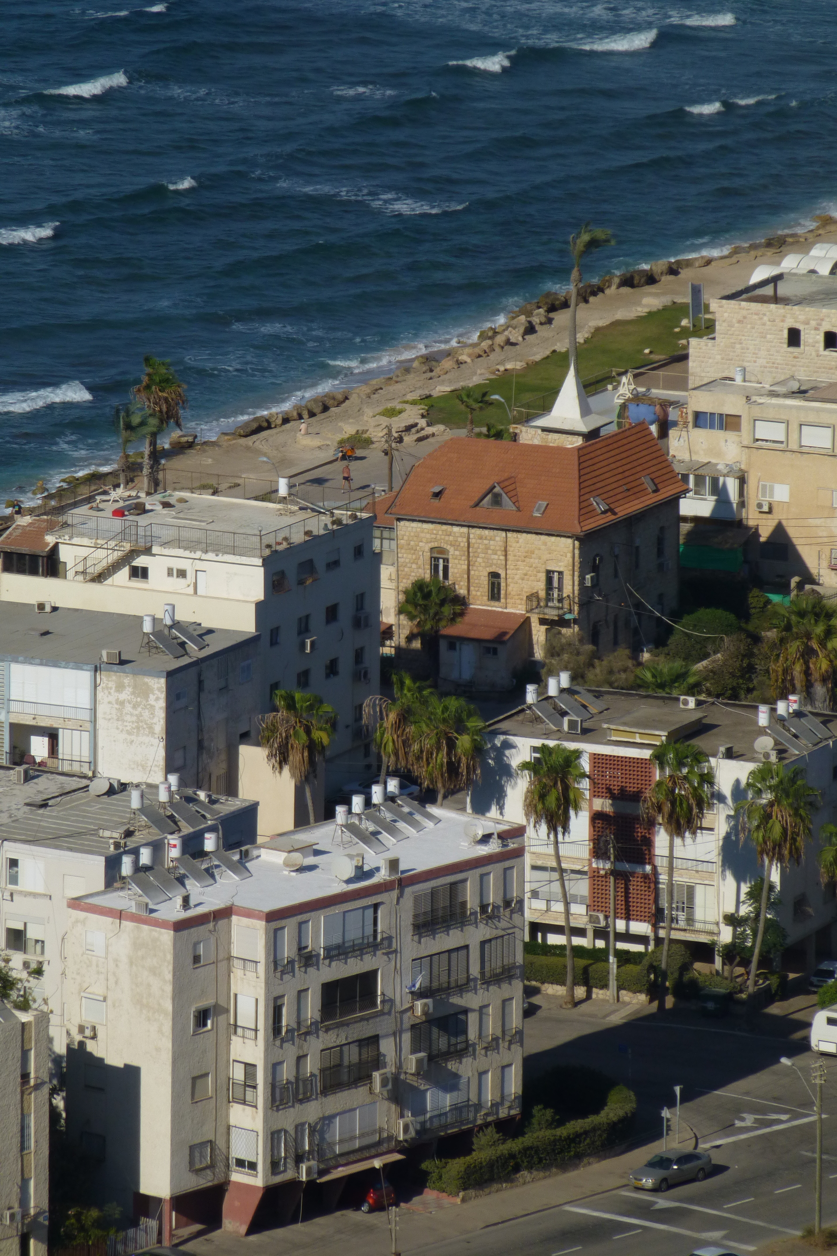 בית ויקטור כהן בחיפה